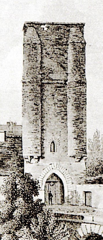 Détail de la tour Saint-Jean au XXème siècle.